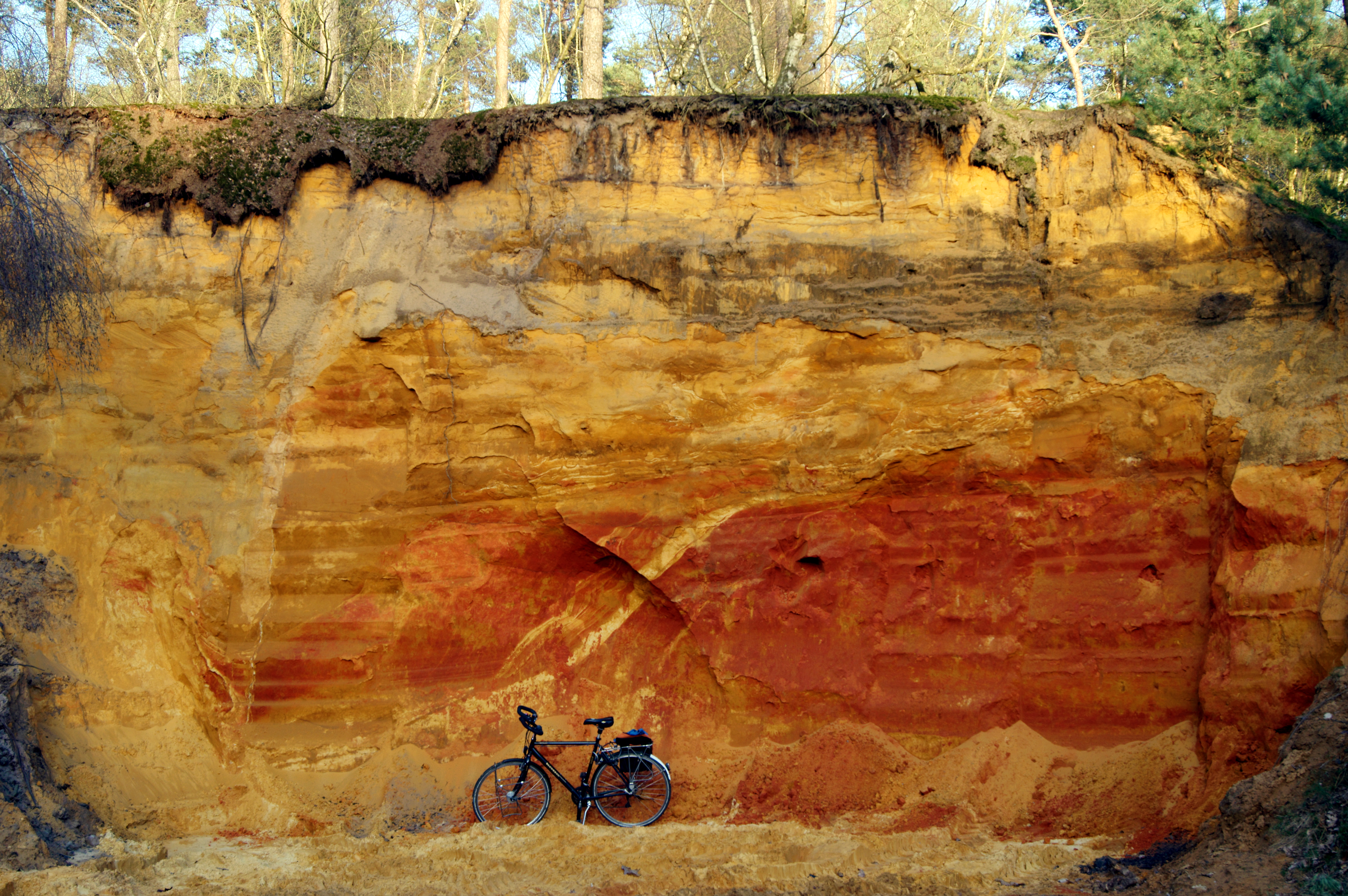 Bodenaufschluss am Hünsberg in der Coesfelder Heide. Unter einer geringmächtigen Podsolschicht und quartären Flugsanden folgen kreidezeitliche "Halterner Sande", die während des Santoniums (ca. 86,3 – 83,6 mya) in bis zu 250 Meter mächtigen Lagen in einem Urmeer sedimentierten. Licensing Attribution: © Günter Seggebäing, CC BY-SA 3.0